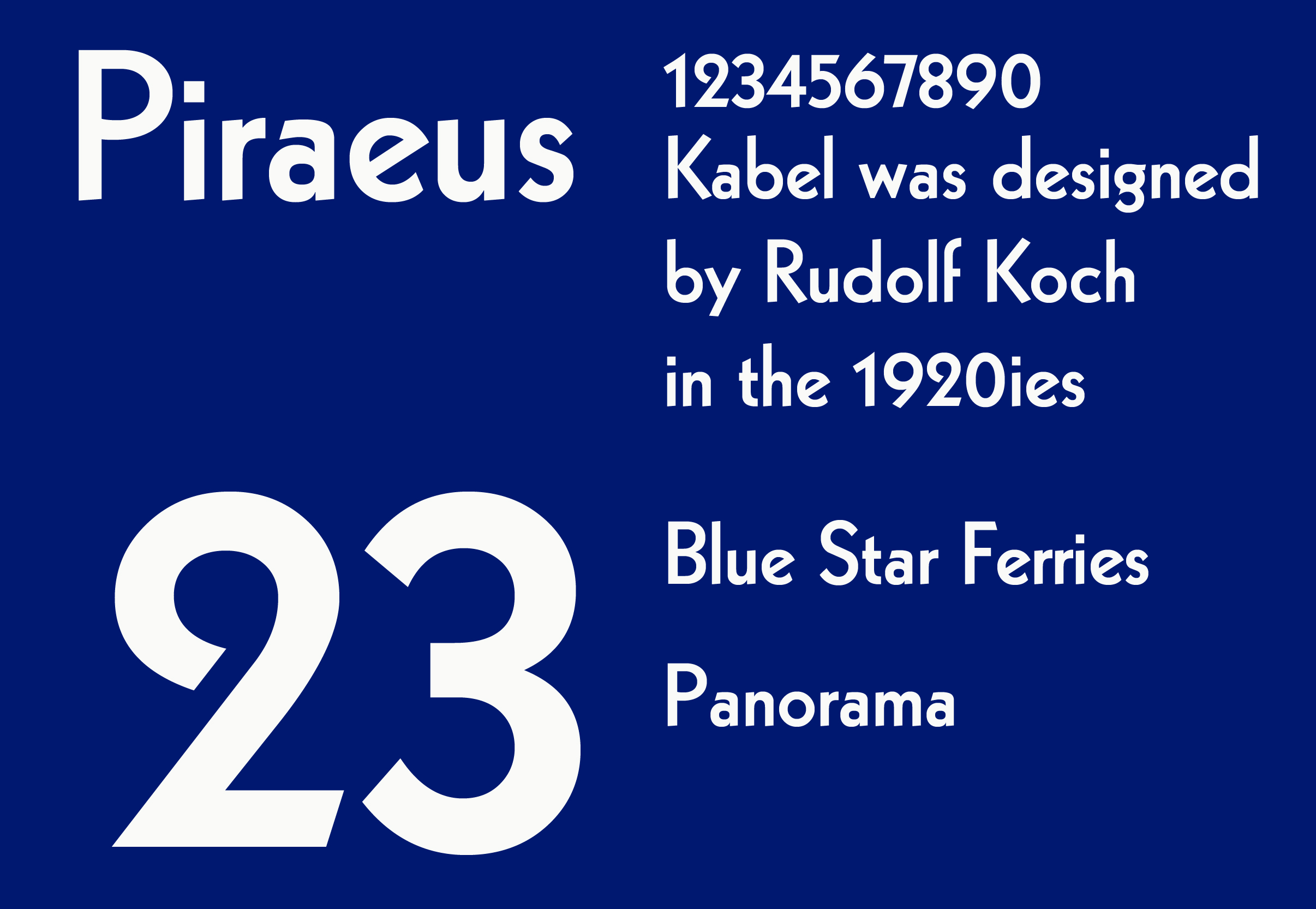 ή Κάμπελ.